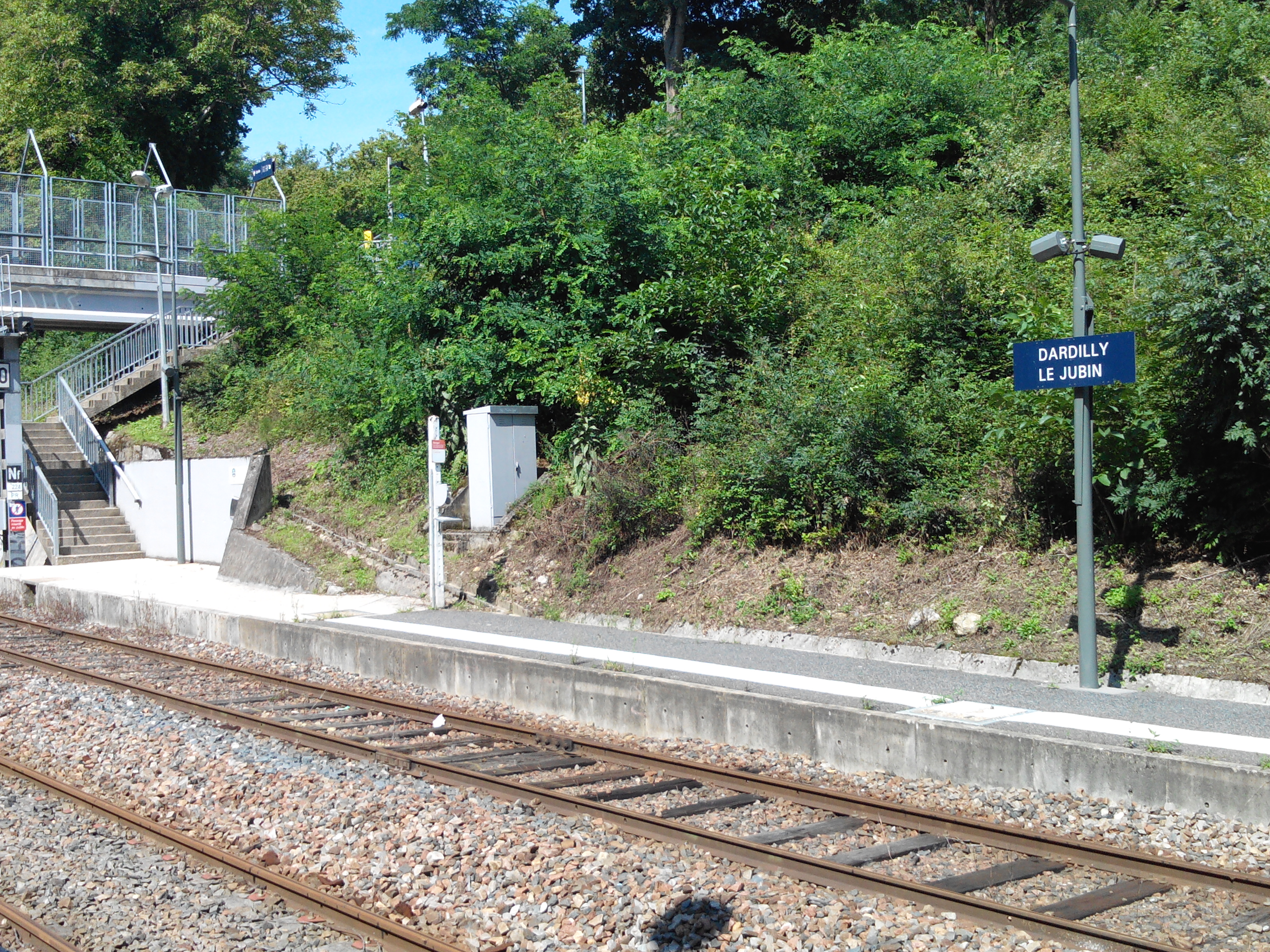 Gare de Dardilly-le-Jubin en 2014